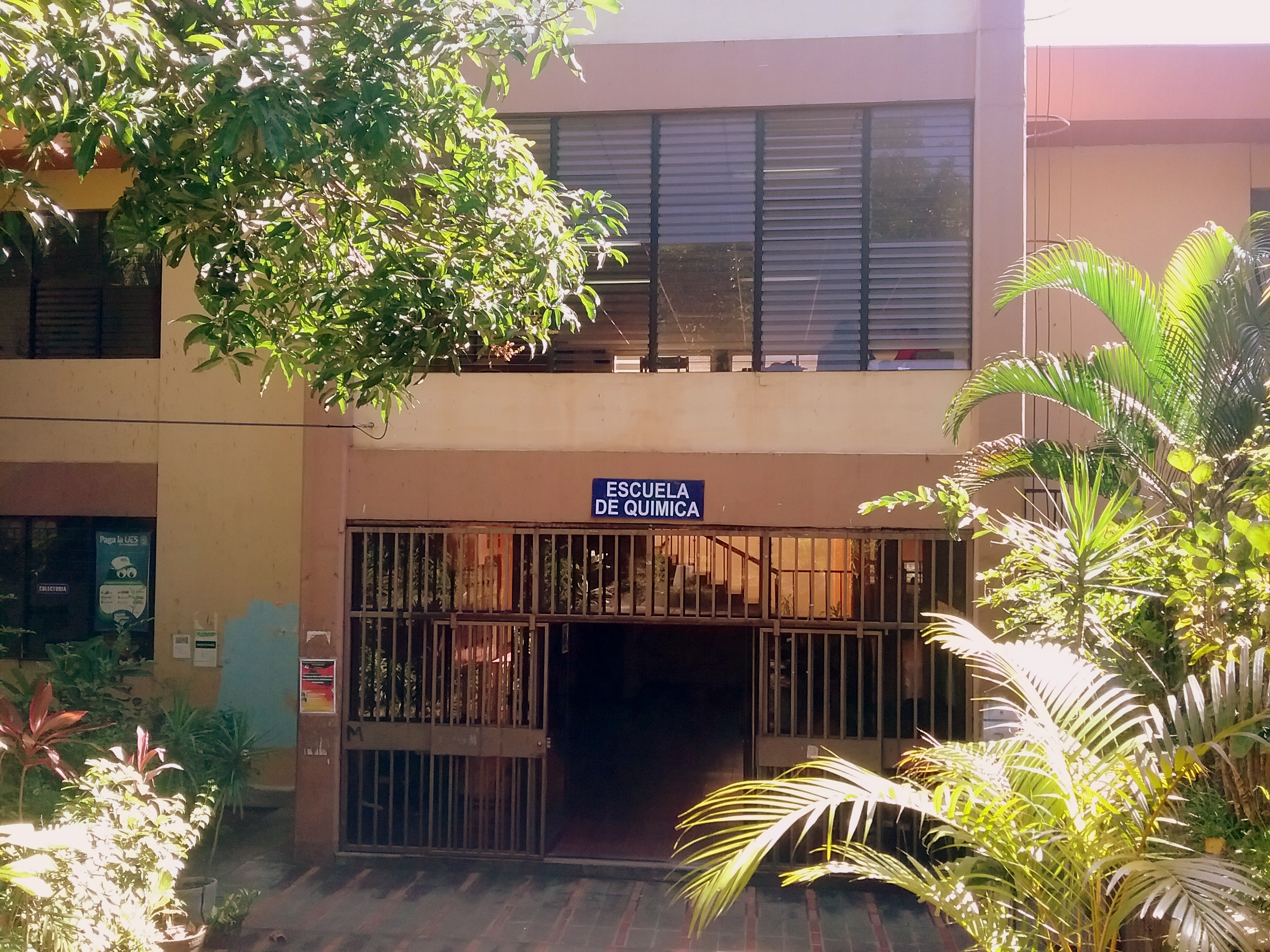 Edificio de la Escuela de Química, Facultad de Ciencias Naturales y Matemática de la Universidad de El Salvador.